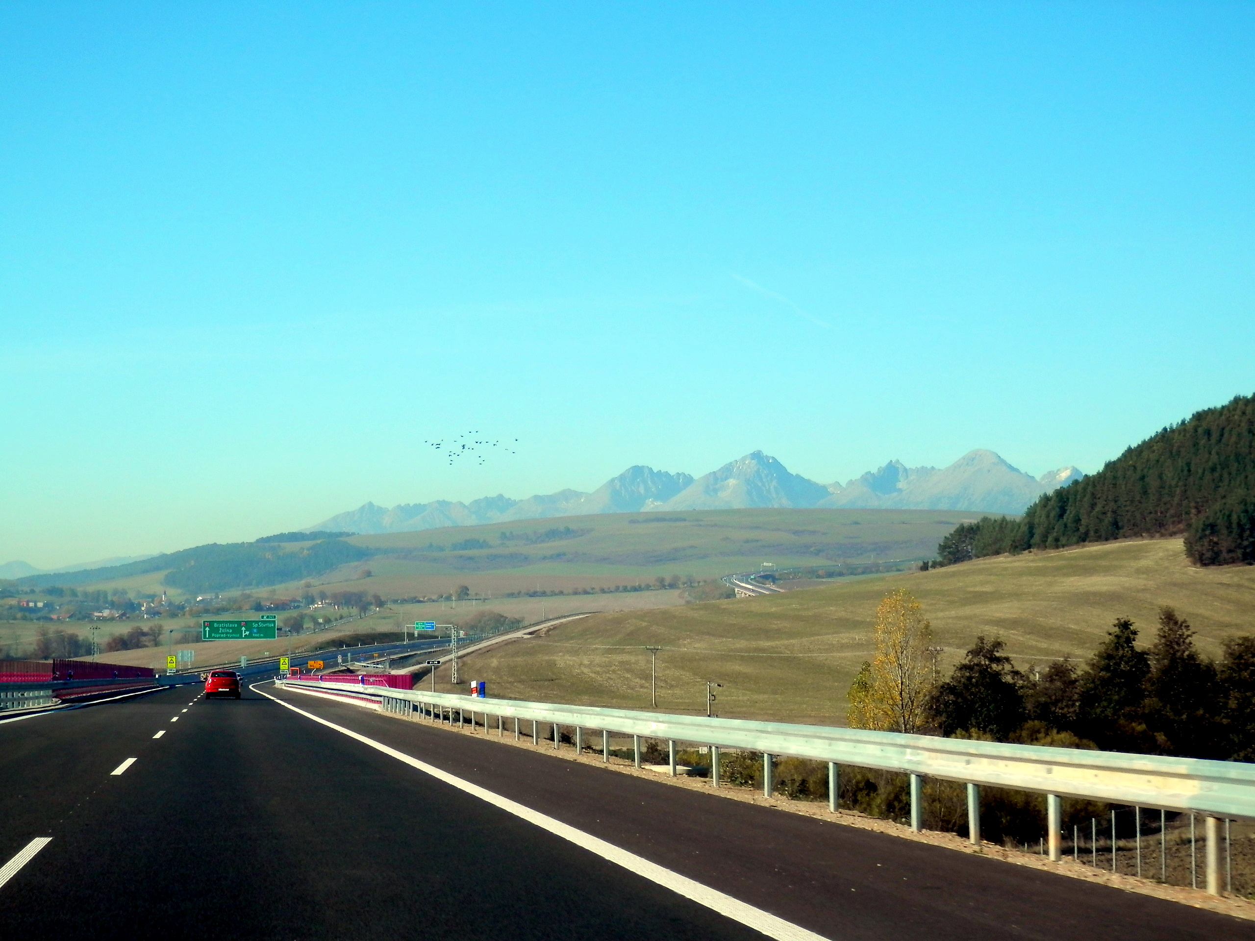 Úsek diaľnice D1 medzi Levočou a obcou Spišský Štvrtok.